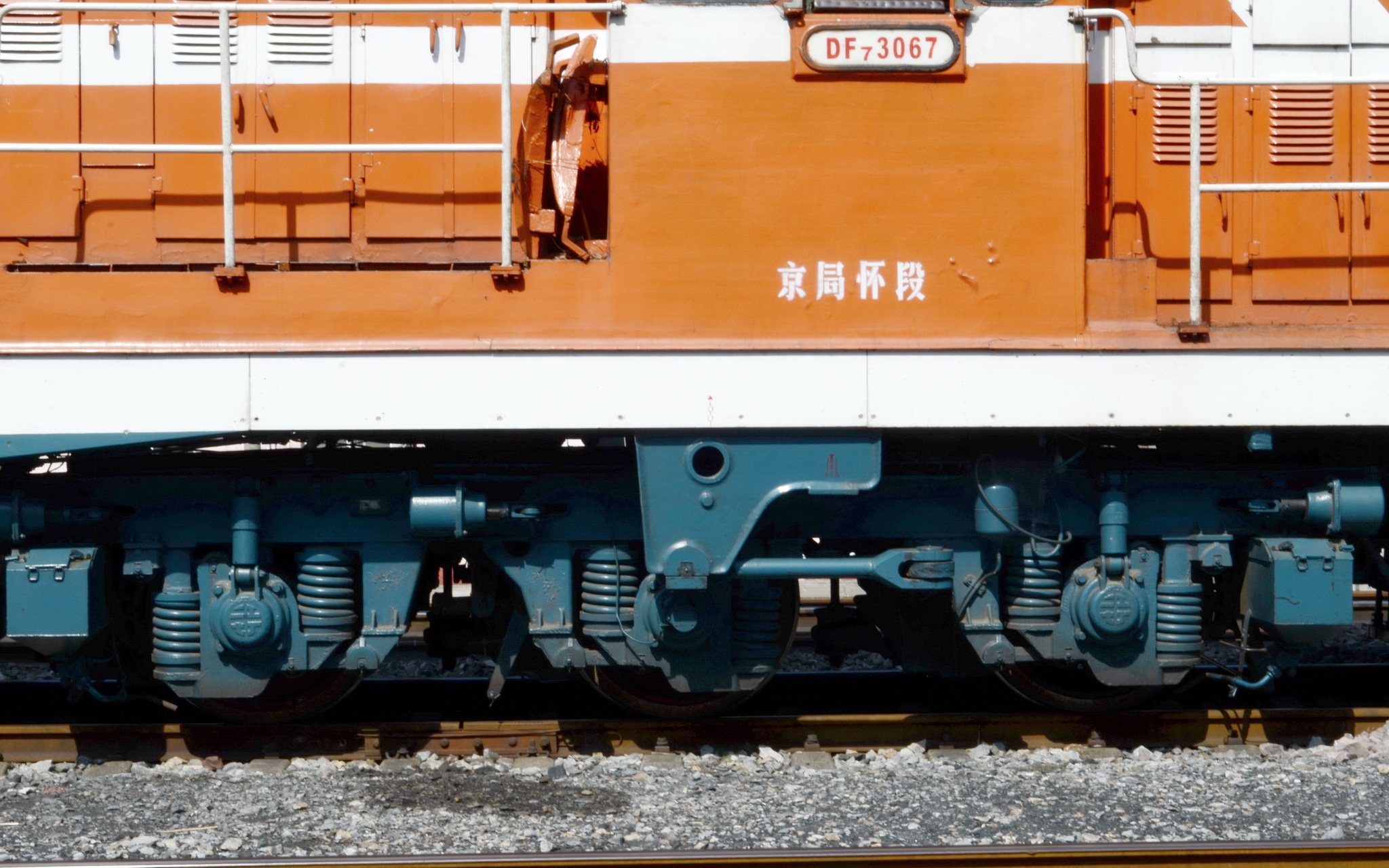 DF7B型3067号机车转向架